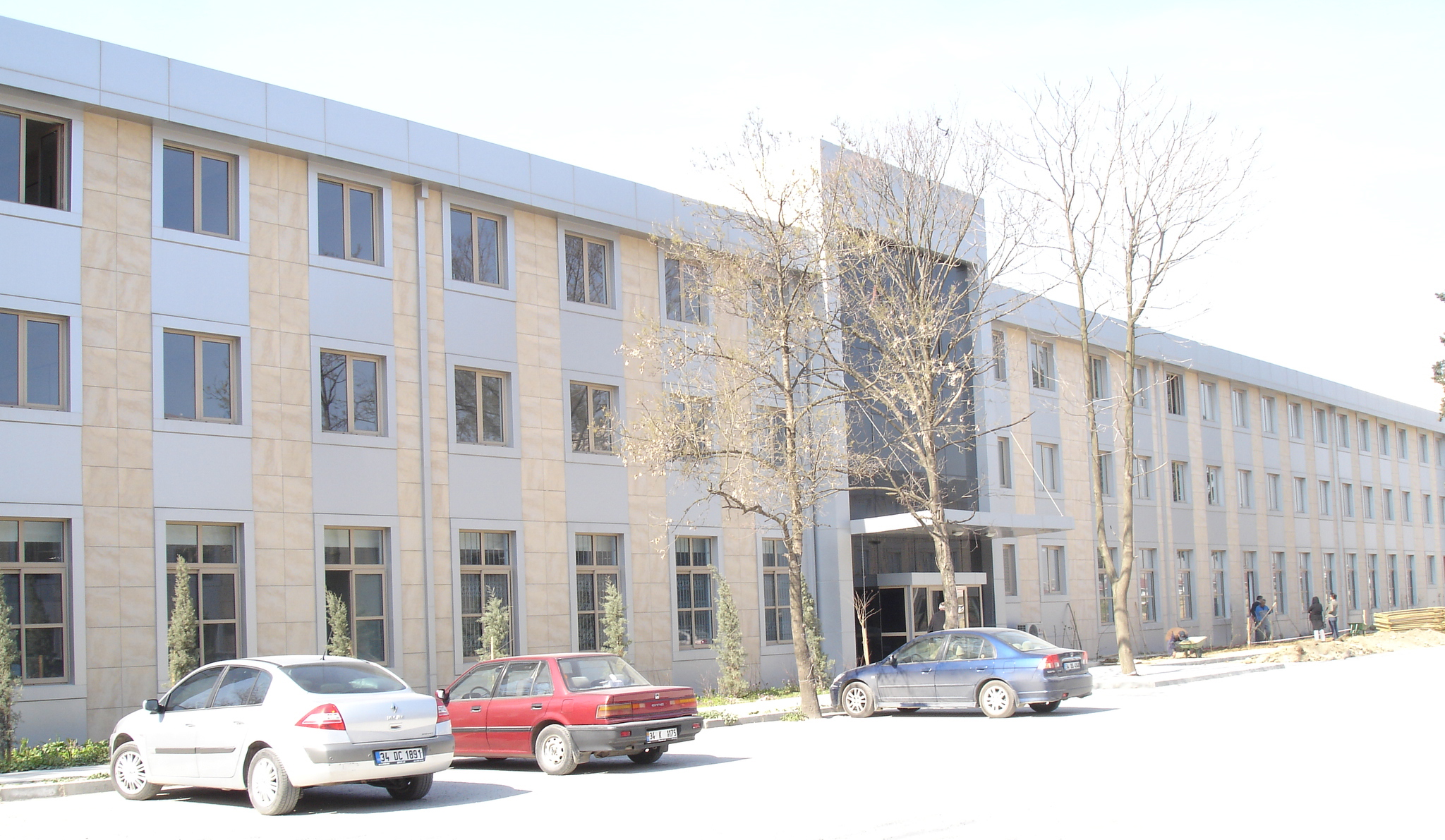 Yıldız Teknik Üniversitesi Davutpaşa Yerleşkesi z blk. Alt katta derslikler ve diğer katlarda da öğretim görevlilerinin odaları yer almaktadır.